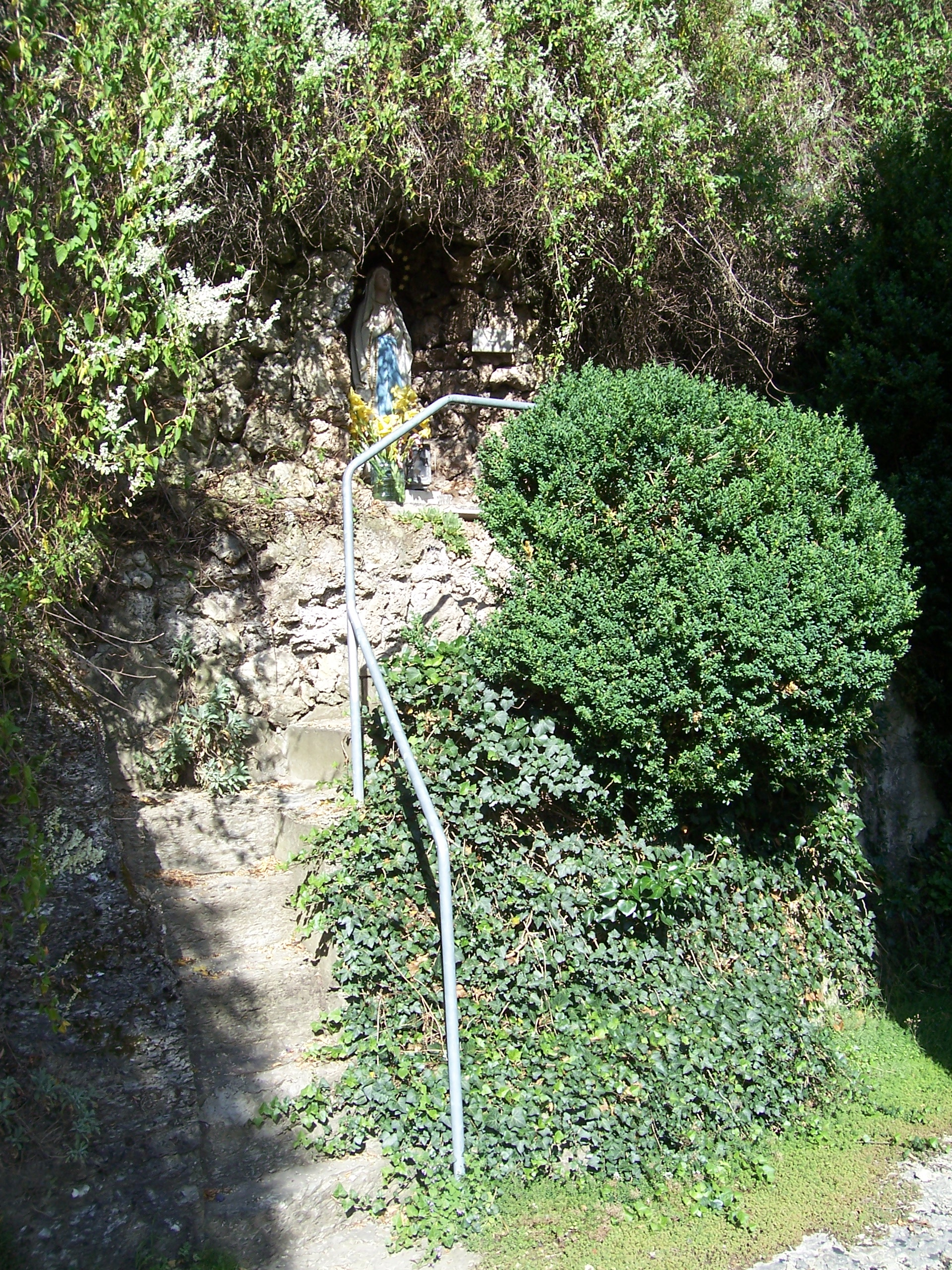 Lourdes-Grotte in Dienstadt (Ortsteil von Tauberbischofsheim) hinter der Kirche St. Jakobus, errichtet 1936.